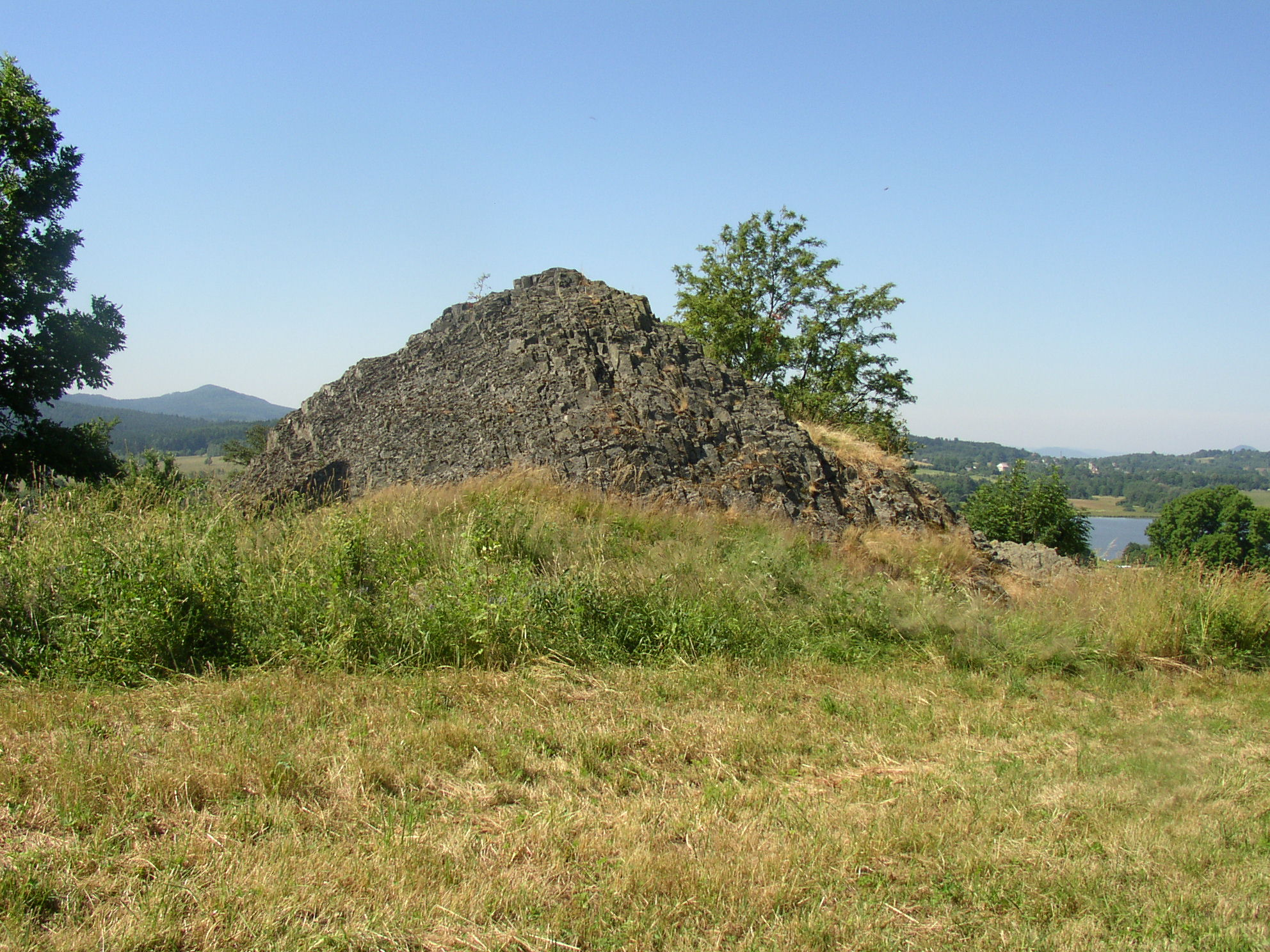 Petružálkova skalka, jiné zdroje Světlický vrch 512 metrů nad mořem, Šluknovská pahorkatina, Horní Podluží